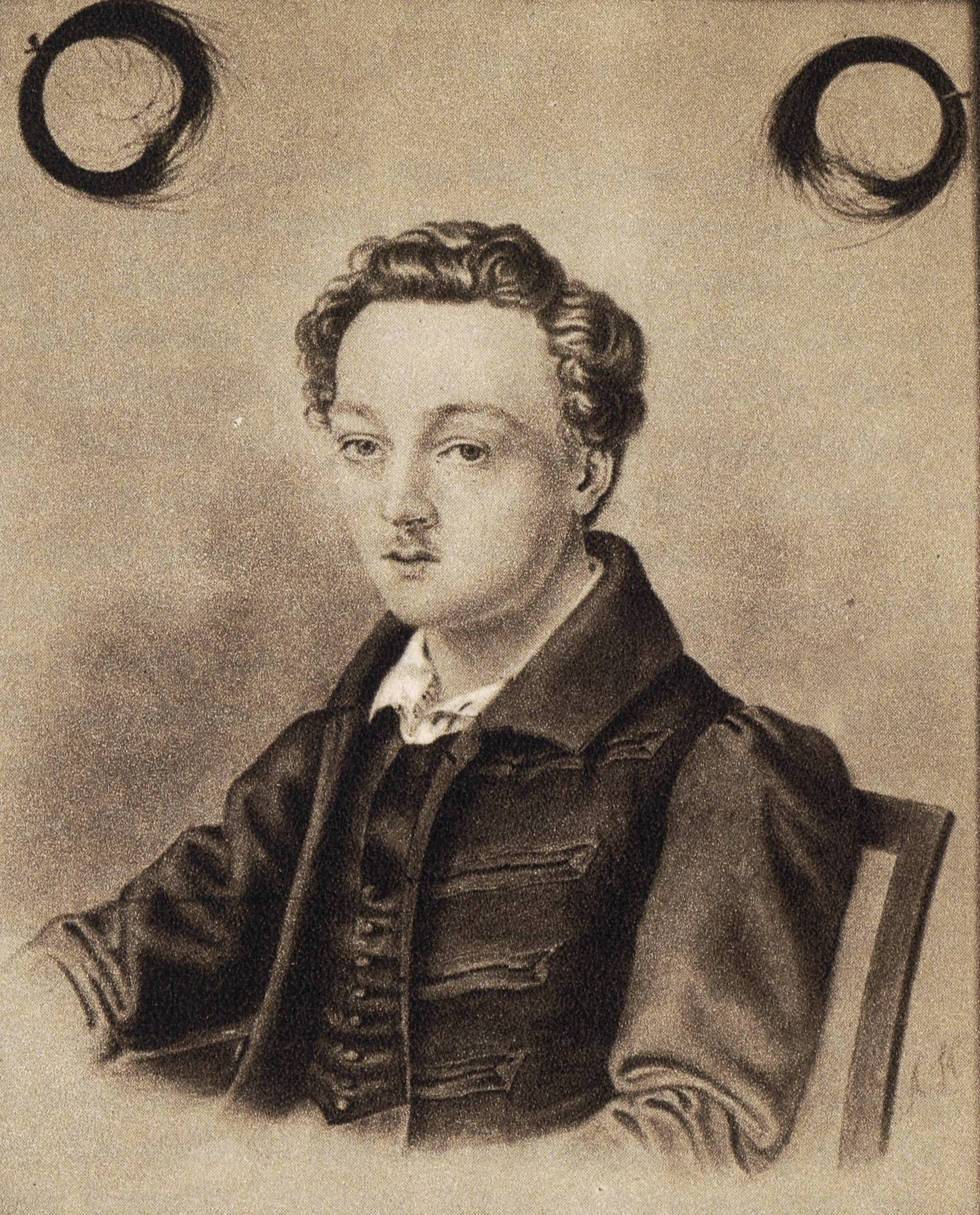 Georg Büchner, Porträtzeichnung von Adolf Hoffmann (Original befand sich im Besitz von Büchners Familie in Darmstadt; 1944 verbrannt)